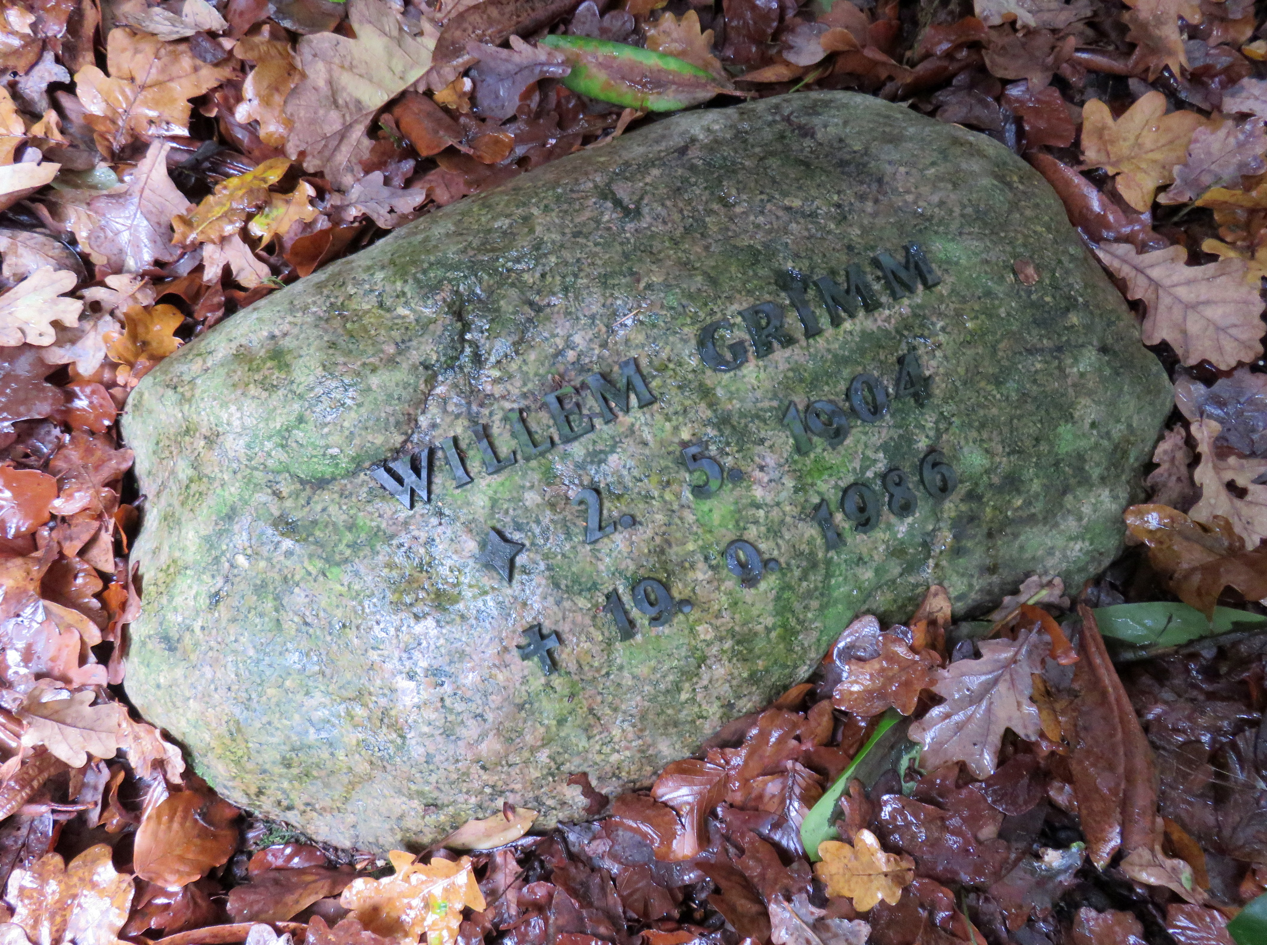 Kissenstein des deutschen Malers und Grafikers Willem Grimm auf der Familiengrabstätte Grimm, Friedhof Ohlsdorf, Planquadrat Y 21 (nordöstlich Kapelle 2). Biografie: Der neue Rump. Lexikon der bildenden Künstler Hamburgs, Altonas und der näheren Umgebung, Neumünster 2013, ISBN 978-3-529-02792-5, S. 157-158.